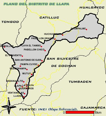 Mapa de Llapa